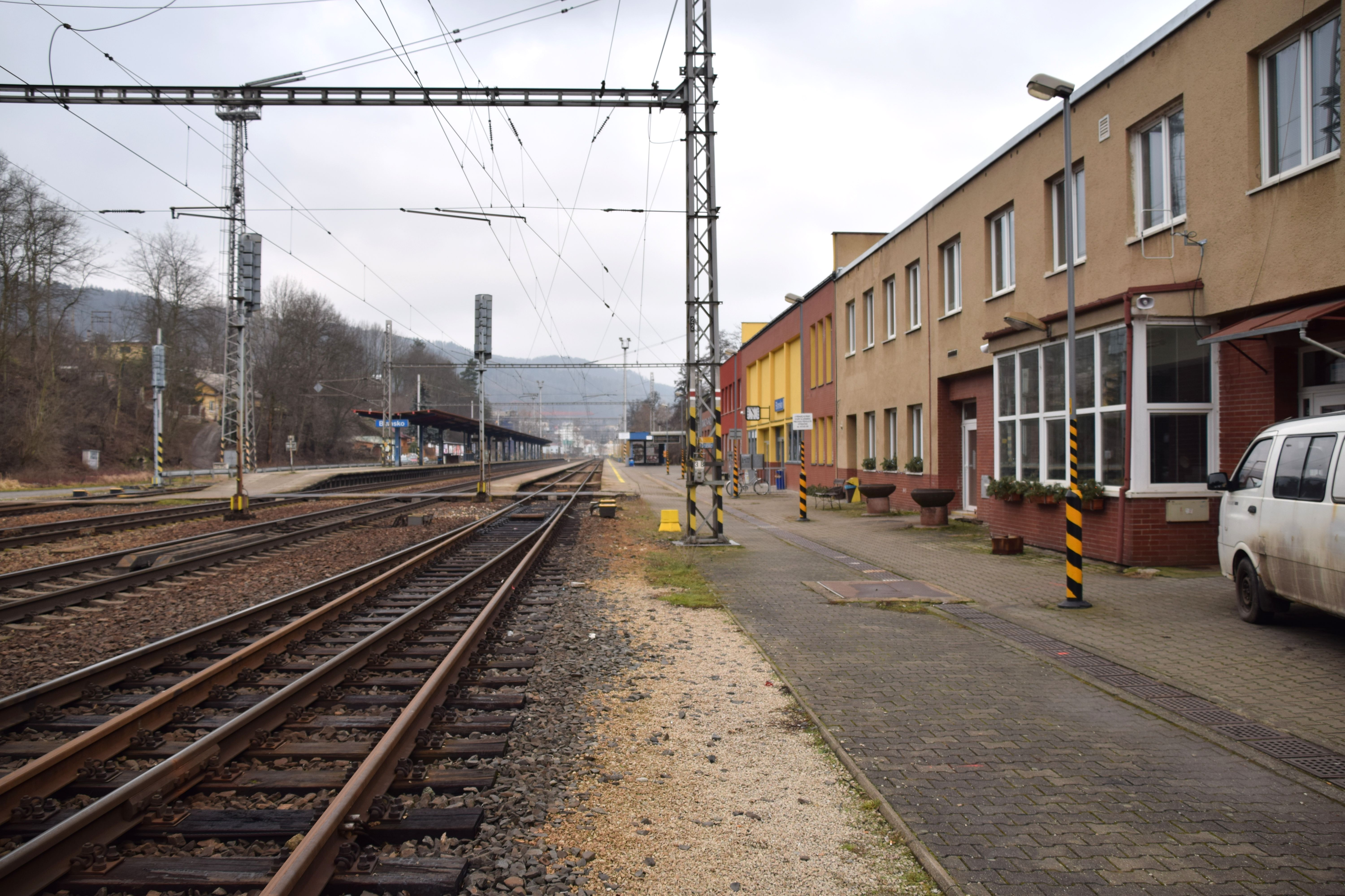 Budova nádraží v Blansku